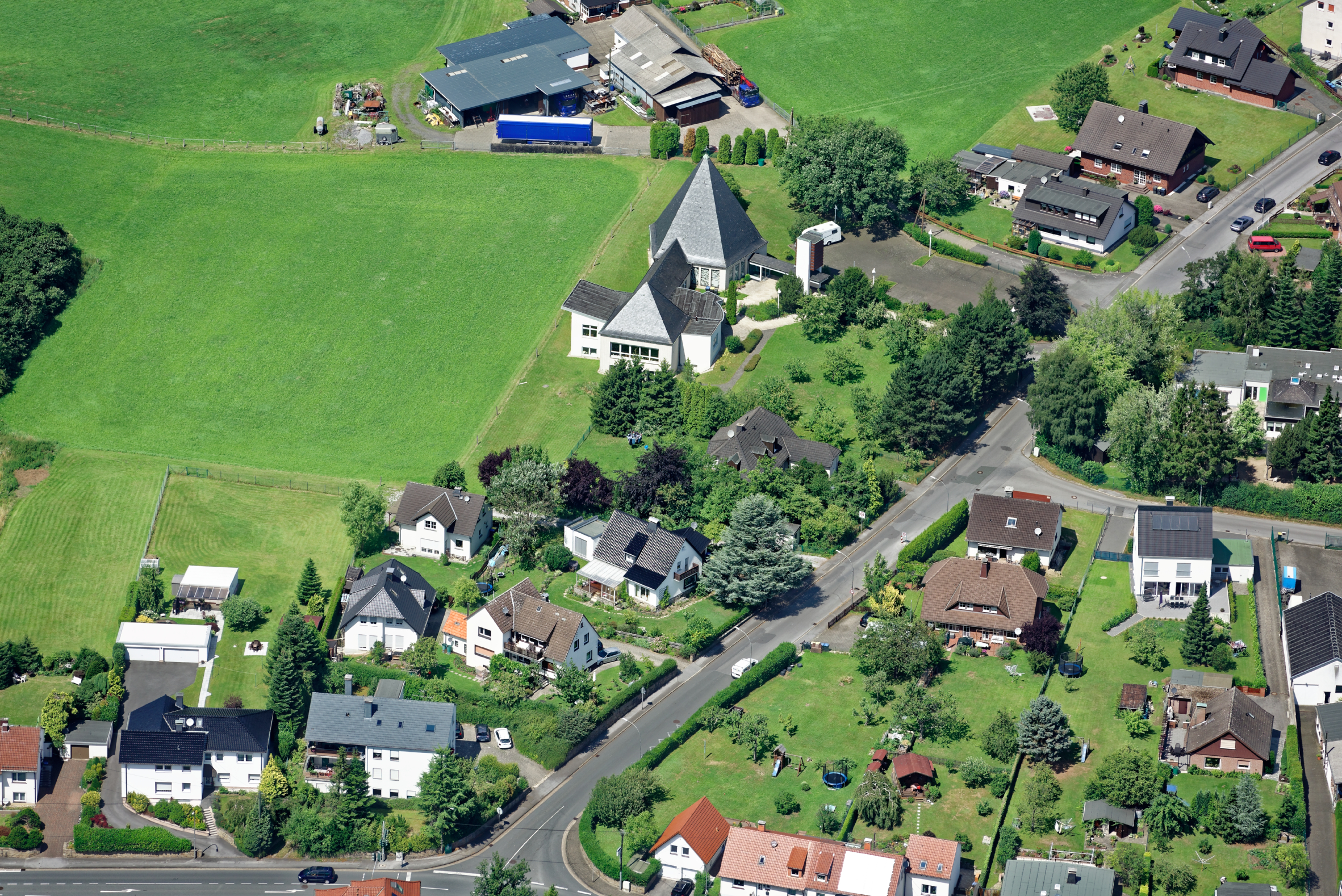 Fotoflug Sauerland West. Luftaufnahme: Kreuzkirche Landhausen in Hemer.